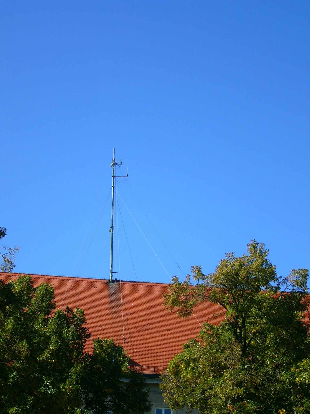 Radio antenna (Police), seen at Rosenheimer Str. 130 in München, Germany.